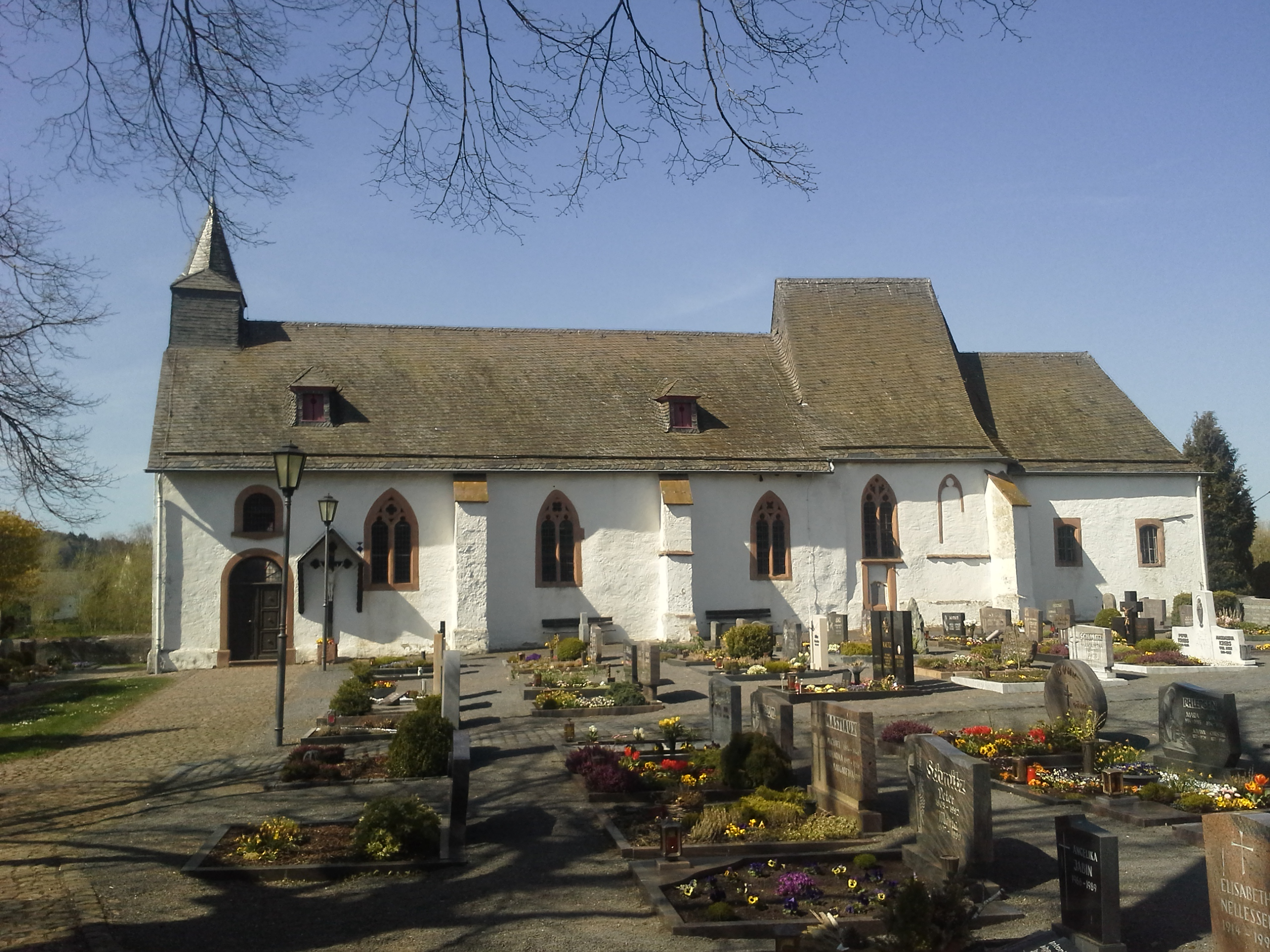 Wiesbaum, ehemalige katholische Pfarrkirche St. Martin, heute Friedhofskapelle